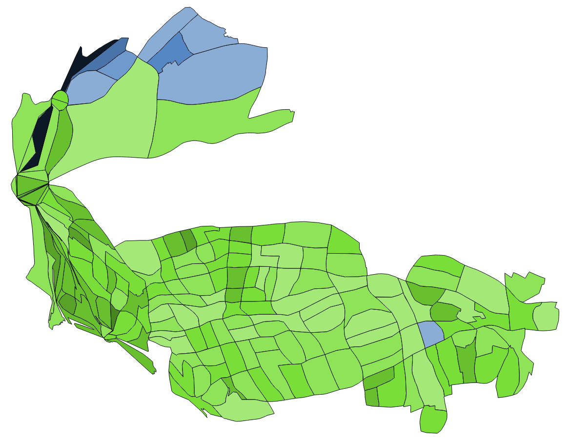 中文（台灣）: 顏色對照表